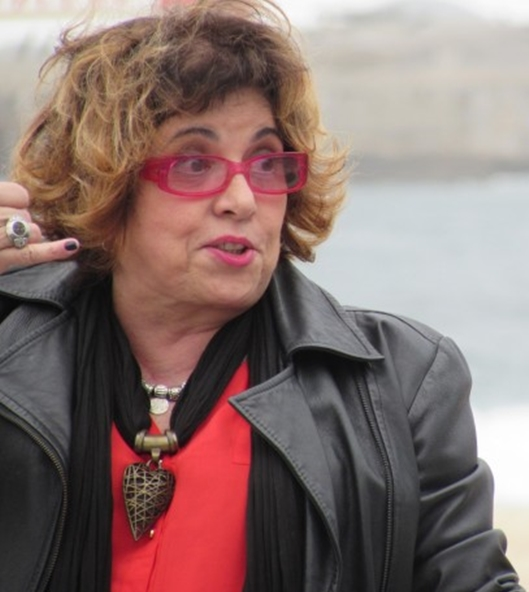 Lúcia Alves (Belo Horizonte, 4 de outubro de 1948) é uma atriz brasileira.